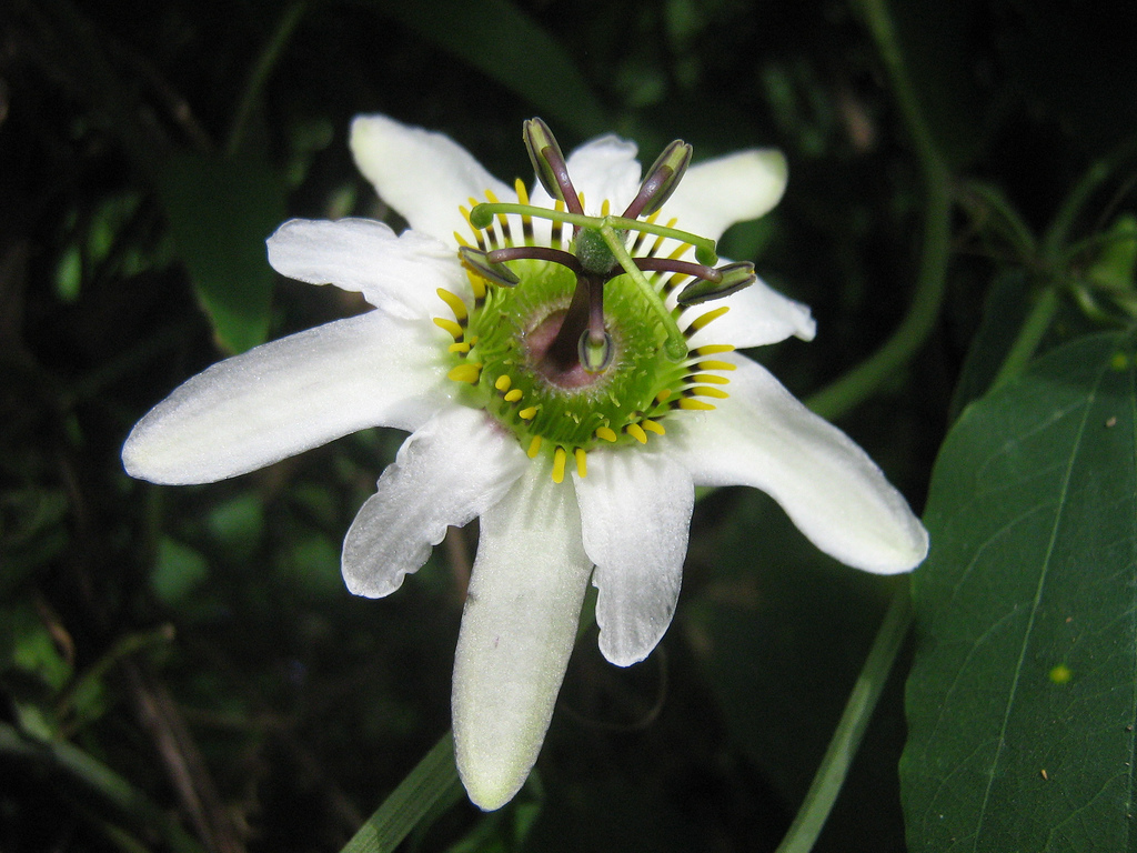 Jardin Botanico del Quindio